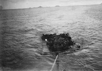 中文（香港）: 1906年9月18日香港丙午風災中，颱風過後無人認領的屍體被集體海葬；明報轉載香港海事博物館。